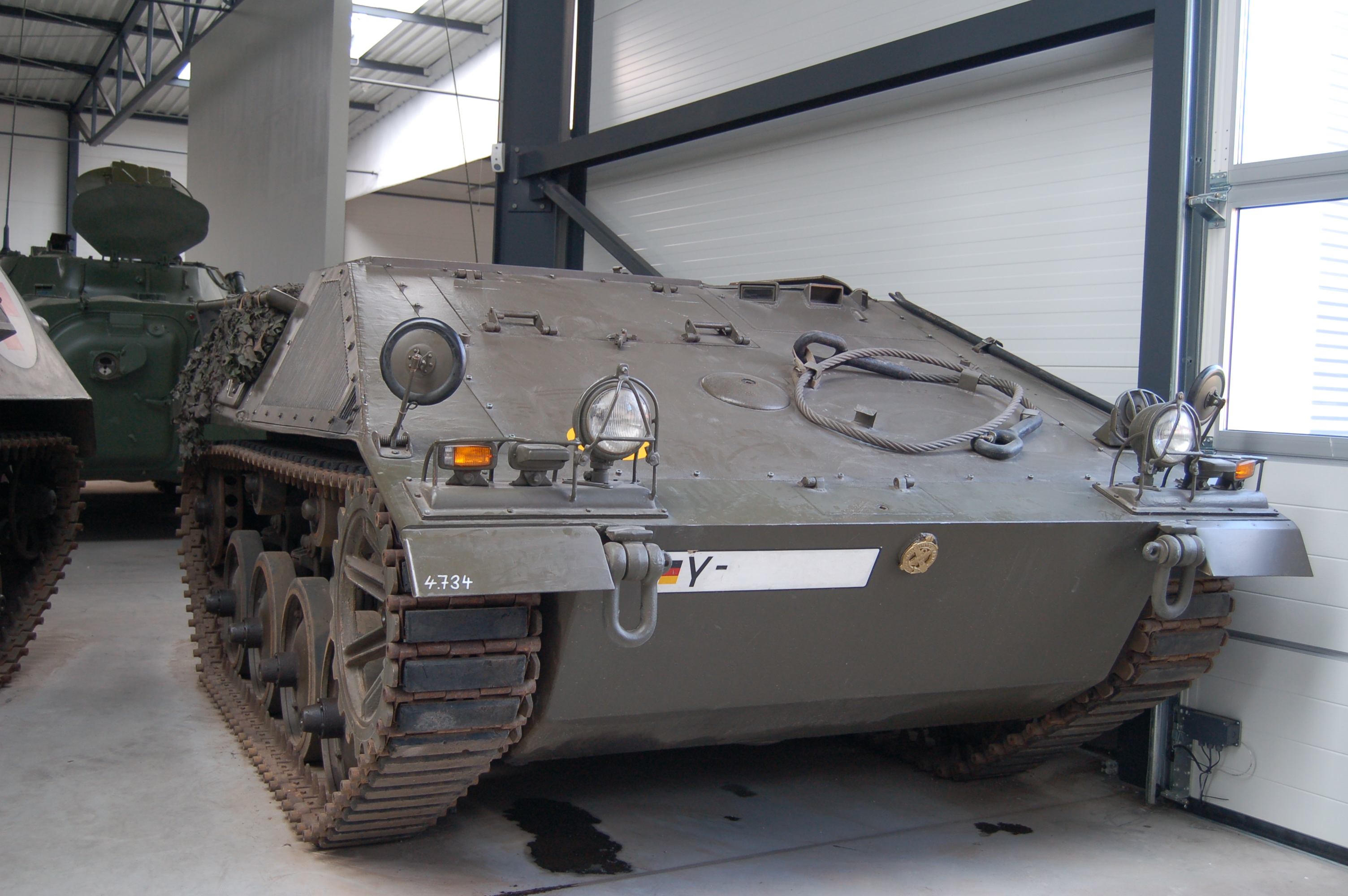 Transportpanzer "Cargo" Hotchkiss TT 6 Besatzung: 2 Soldaten Gewicht: 6,4 Tonnen Motorleistung: 121 kW (164 PS) Baujahr: 1958 - 1962 Stückzahl: 180